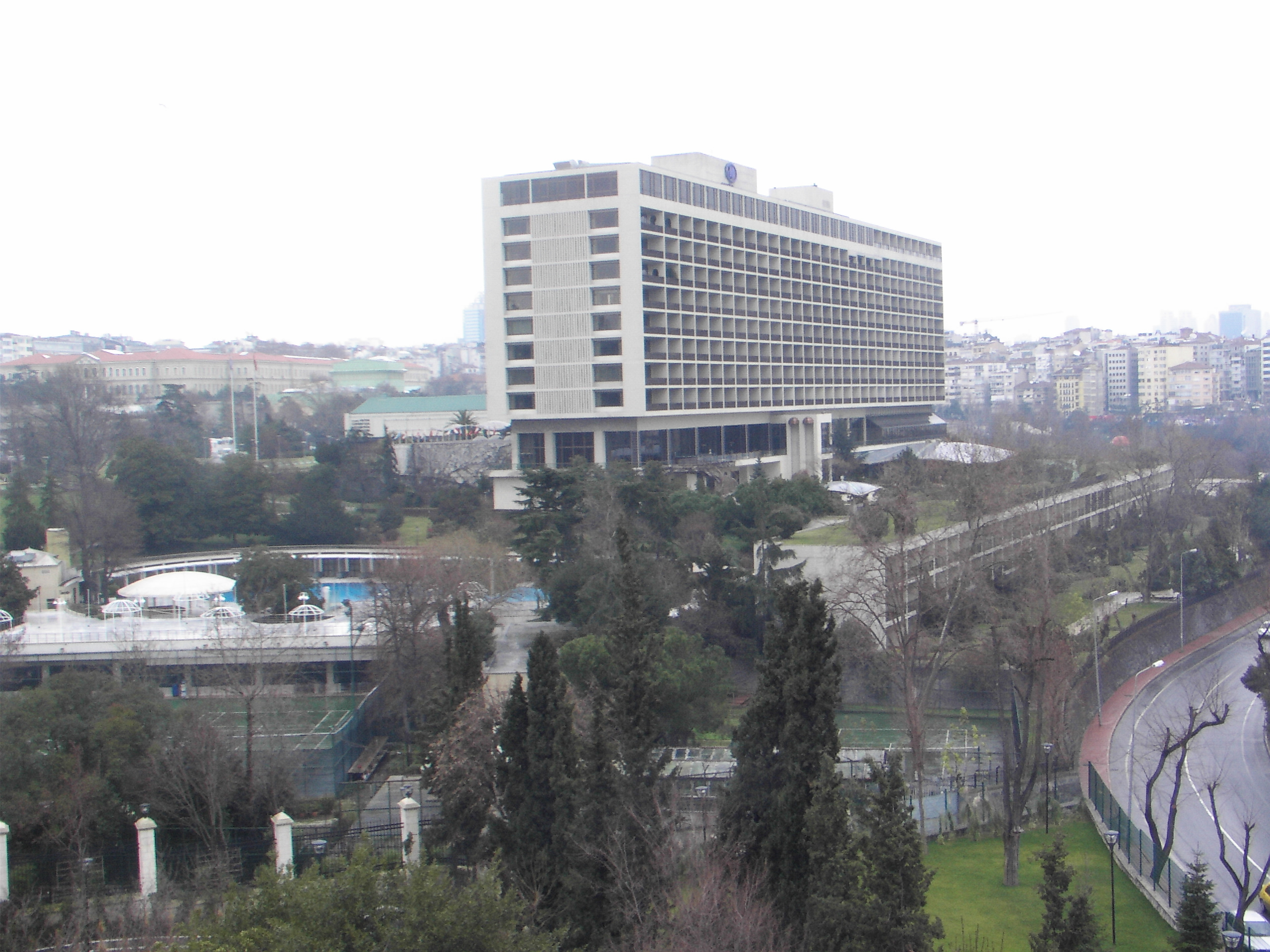 Harbiye'deki Hilton otelinin Taksim tarafından görünüşü